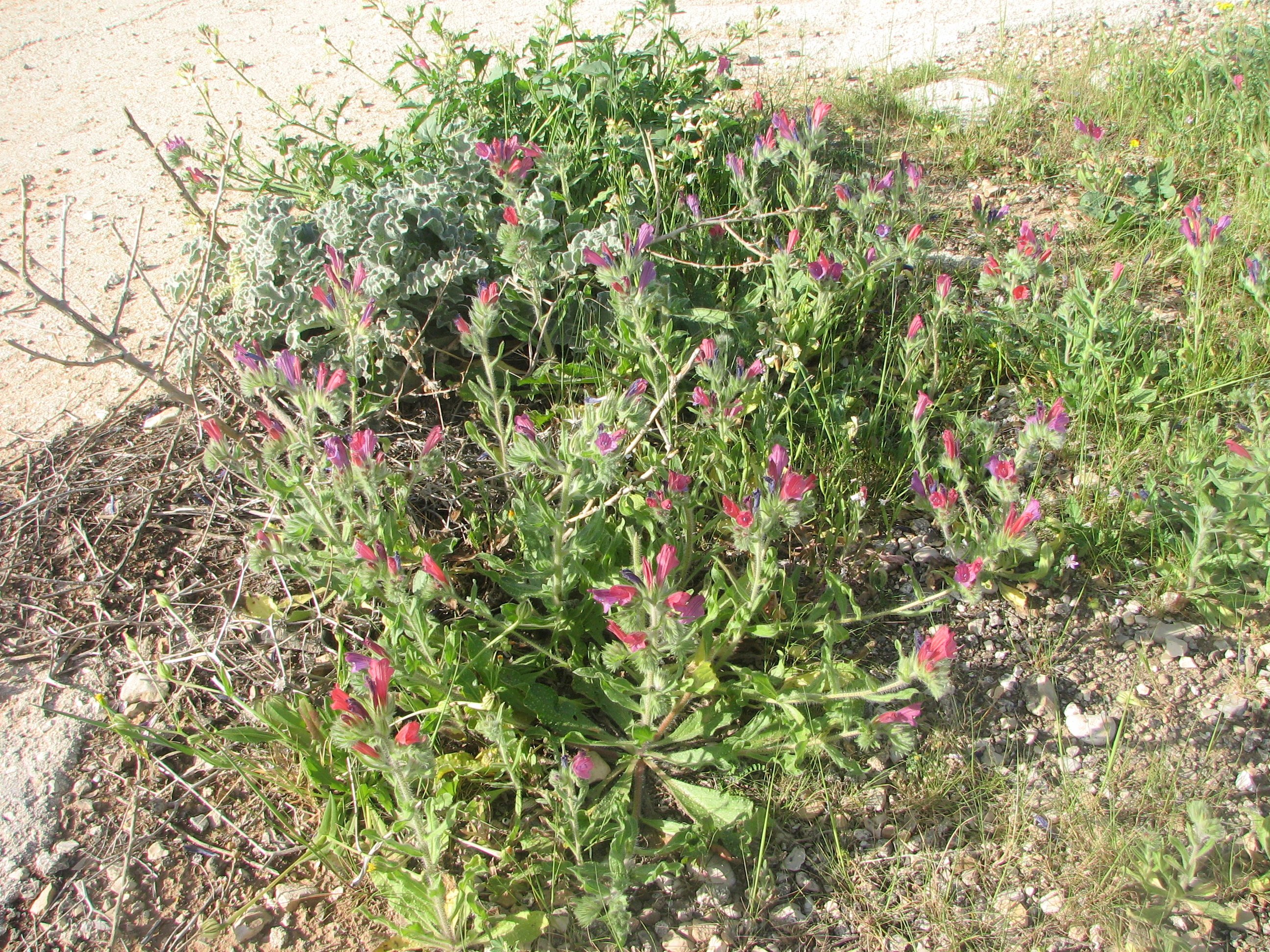 Fatzael Valley in the west side of Jordan Valley Views, Animals, flowers בקעת פצאל בבקעת הירדן בצידו המערבי. מראות מהבקעה, נוף, בעלי חיים וצמחיה